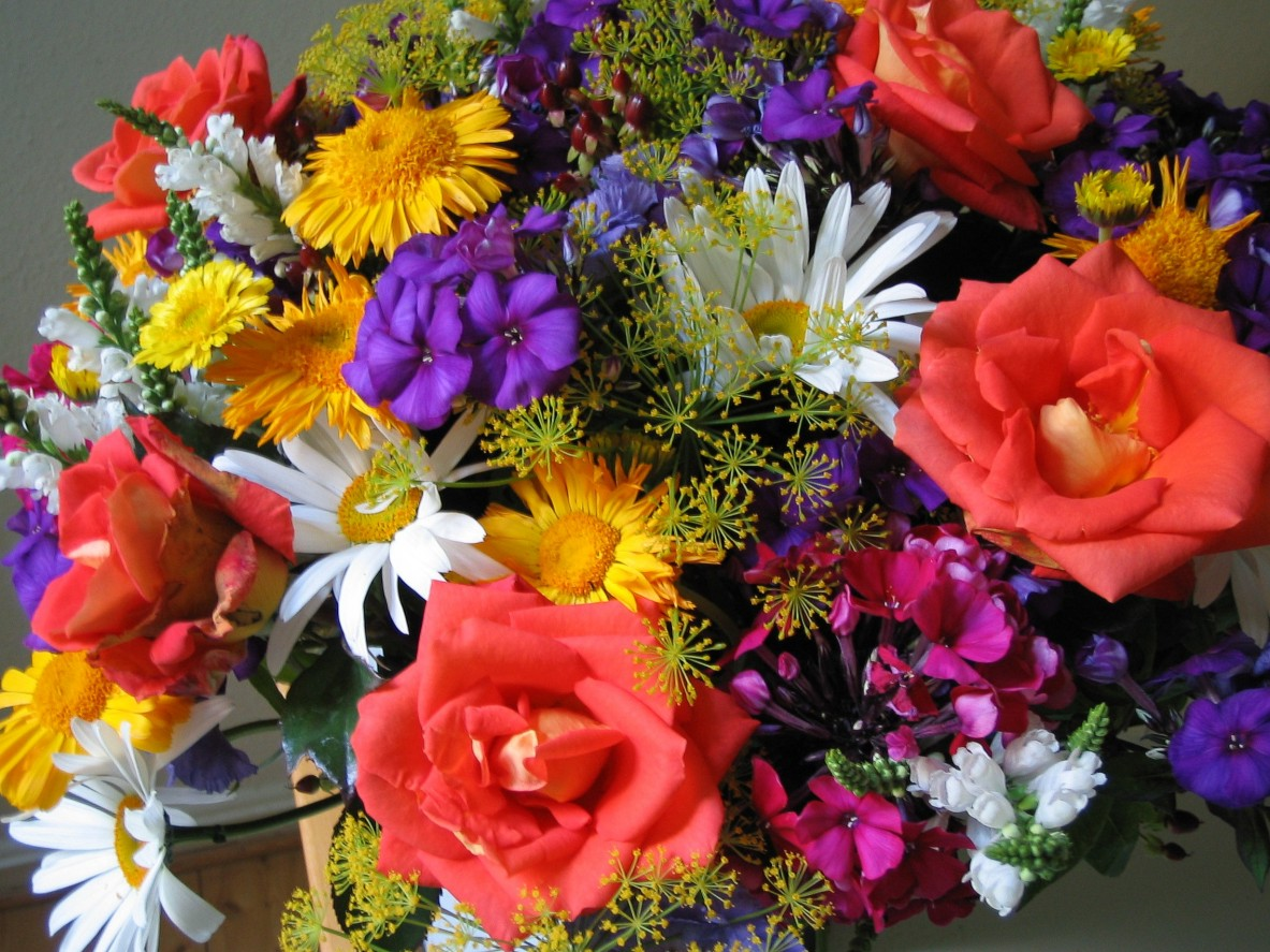 Ein Schnittblumenstrauss